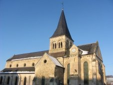 Eglise de Monthiers (02)